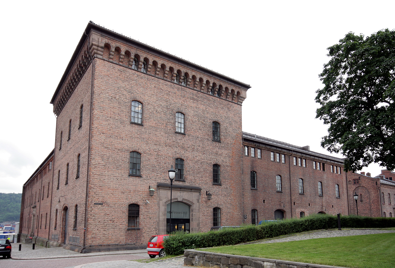 Artillerimagasinet, Akershus festning, Oslo. Arkitekter: Heinrich Schirmer og Wilhelm von Hanno. Bygd 1870